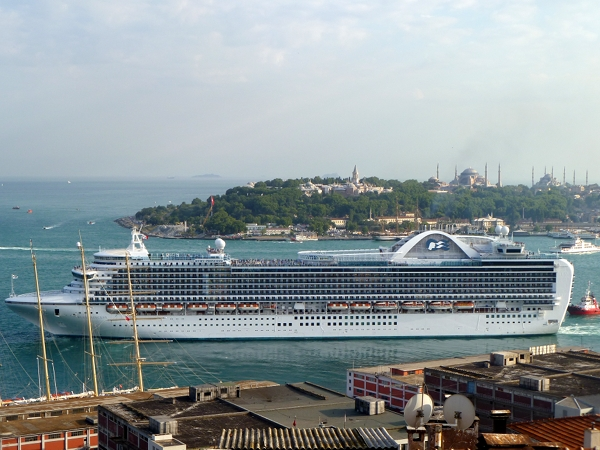 Das Kreuzfahrtschiff "Ruby Princess" verlässt den Anleger im Zentrum von Istanbul (August 2011)